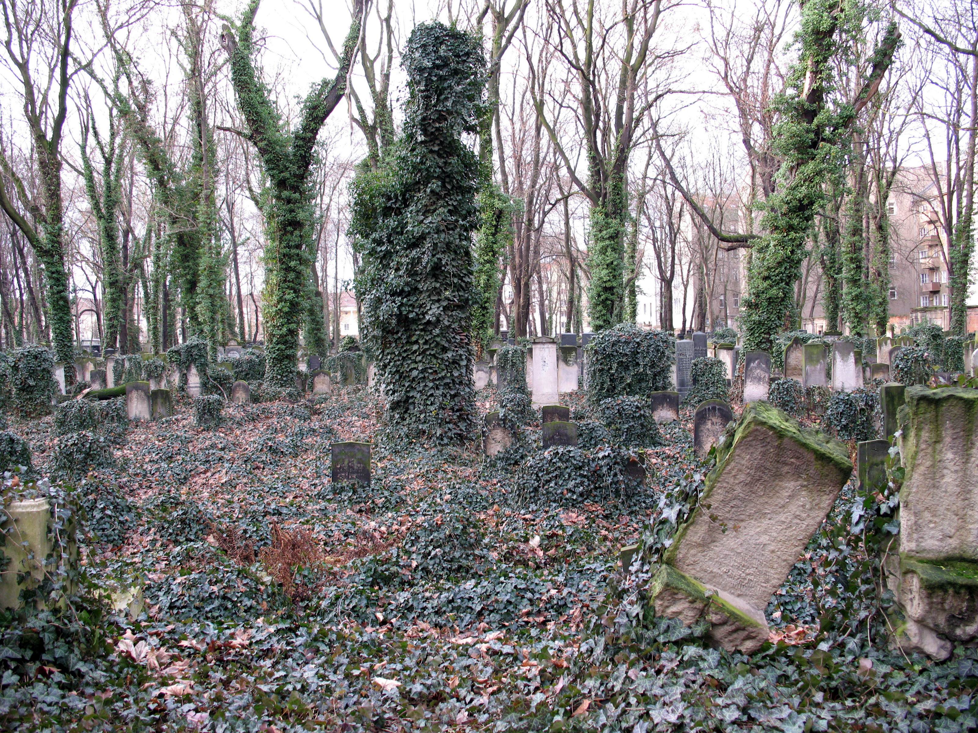 Alter Jüdischer Friedhof, Berlin-Prenzlauer Berg